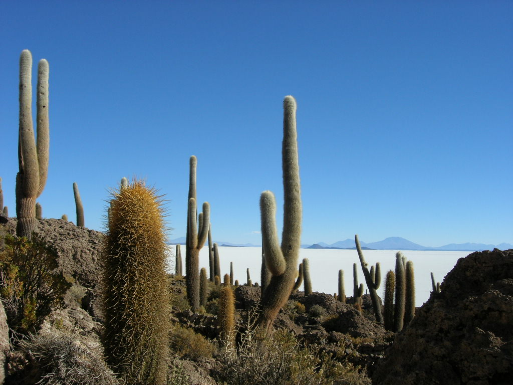 Paisaje en Isla del Pescado - Incahuasi - Salar de Uyuni (Bolivia)